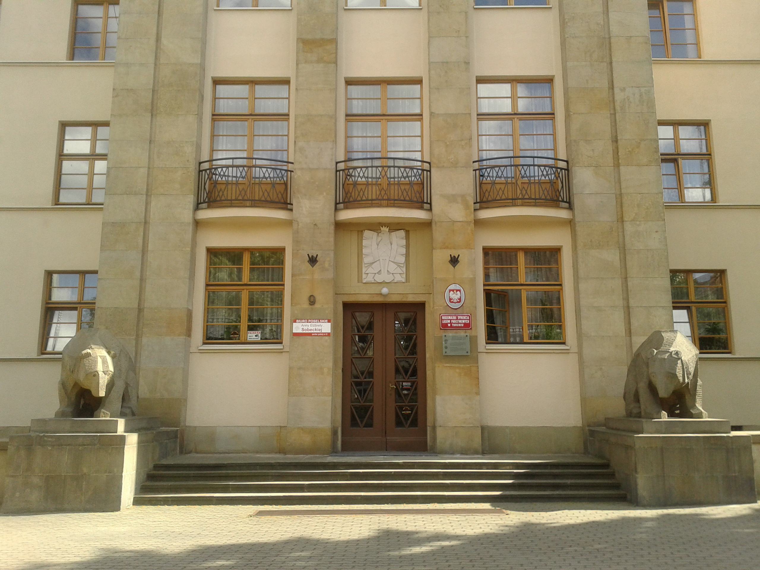 Regionalna Dyrekcja Lasów Państwowych w Toruniu (wejście główne) - ulica Adama Mickiewicza 9 tekst ze szklanej tablicy przy wejściu głównym: Budynek Lasów Państwowych. Gmach Regionalnej Dyrekcji Lasów Państwowych wzniesiony w stylu modernistycznym w 1930 roku według projektu Kazimierz Ulatowskiego. Wejścia do budynku strzegą dwa kaminne niedźwiedzie, autorstwa toruńskiego artysty Ignacego Zelka